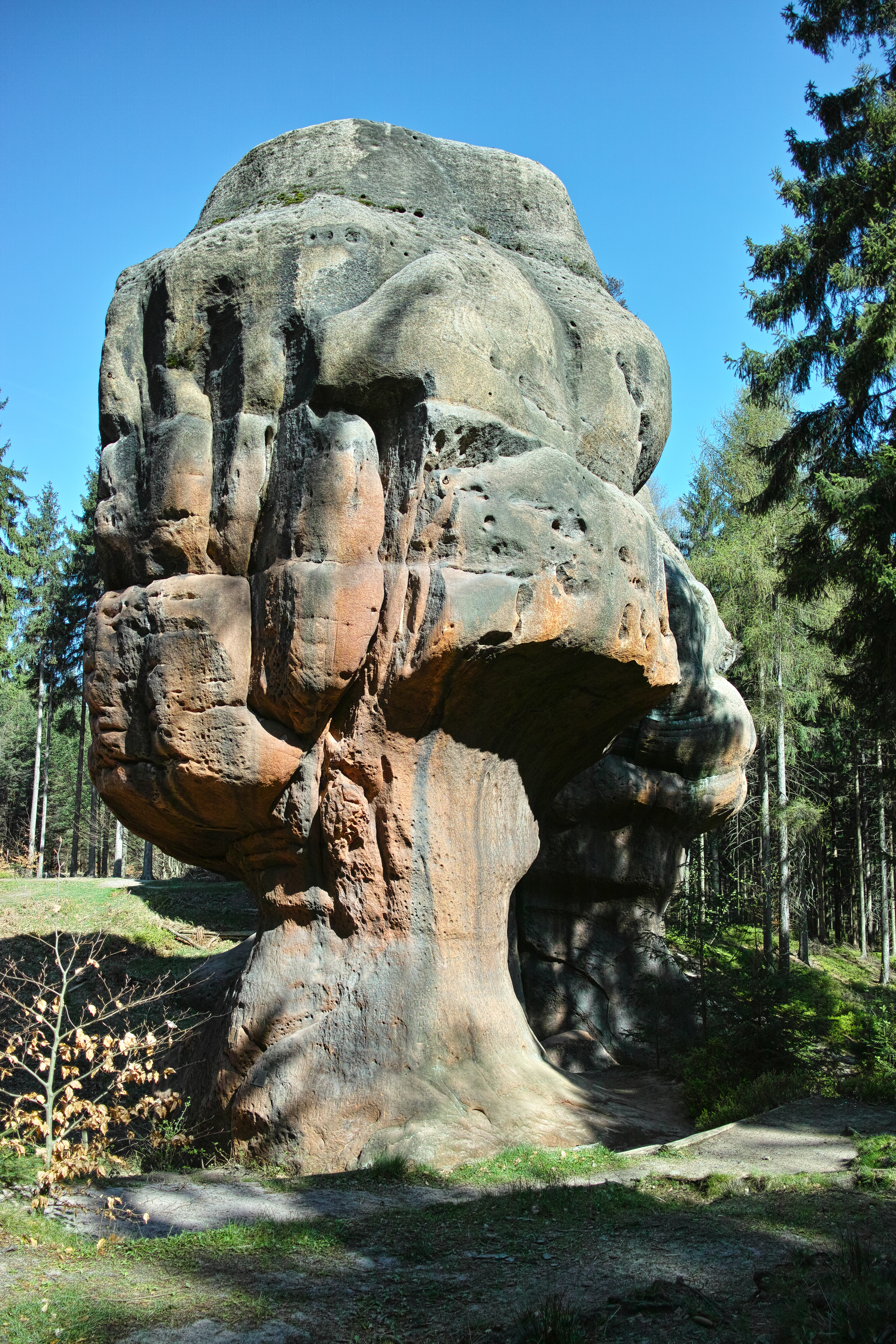 Naturdenkmal Kelchsteine bei Oybin Südseite mit Kletterring im Naturpark Zittauer Gebirge in Sachsen